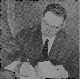 Un auteur prolifique